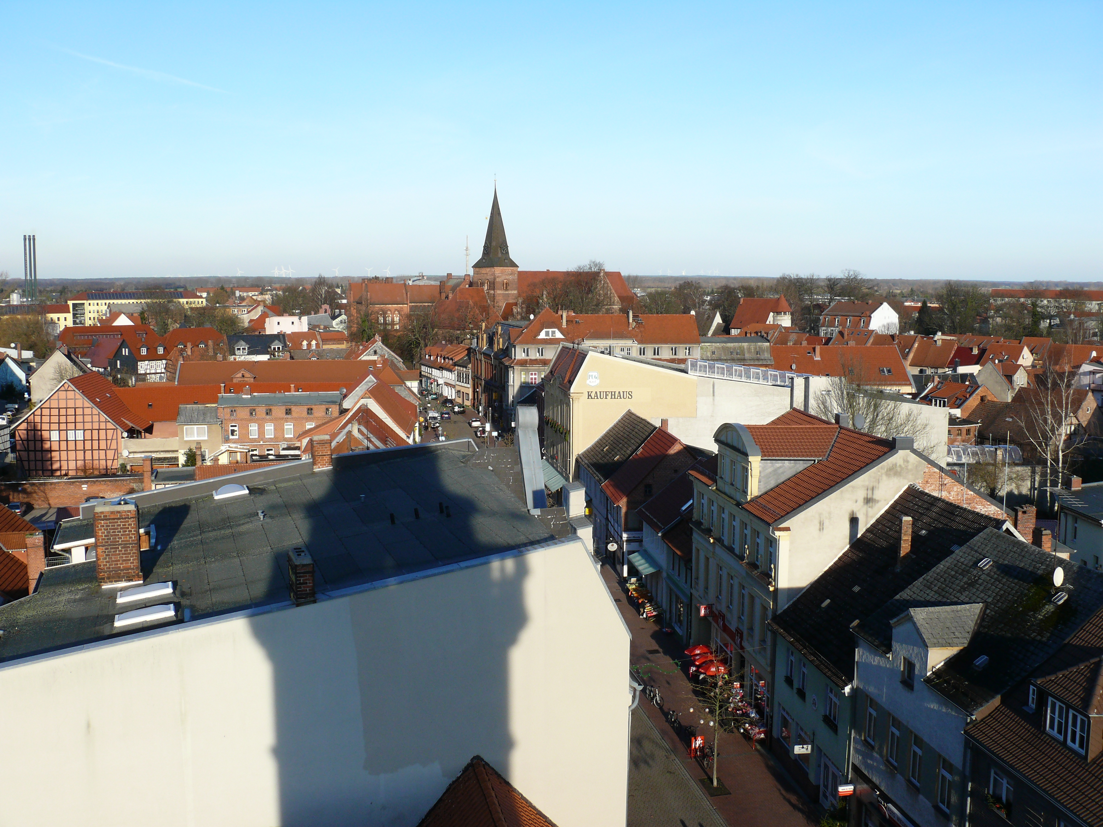 Blick vom Rathausturm der Hansestadt Salzwedel Richtung Norden, entlang der Breiten Straße. In der Bildmitte oben die Katharinenkirche.